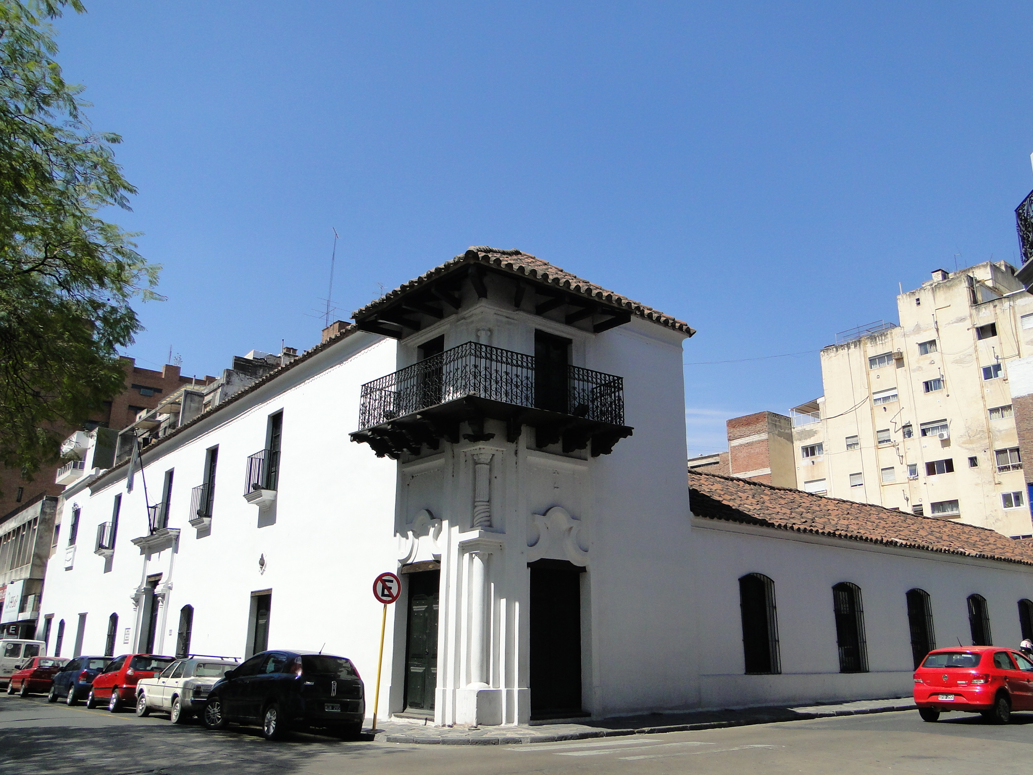 This view currently corresponds to the Marquis of Sobremonte Provincial Historical Museum, location 31°25'01.4"S 64°10'52.6"W. Esta vista corresponde actualmente al Museo Histórico Provincial Marqués de Sobremonte, ubicación 31°25'01.4"S 64°10'52.6"W.